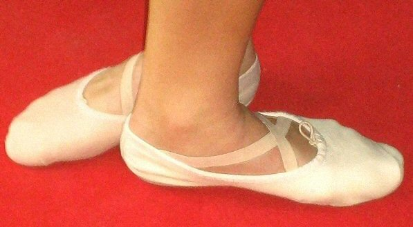 Ballett 3. Position